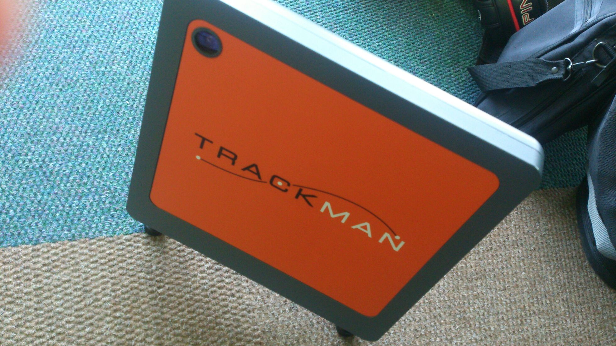 トラックマン（個人所有）。弦巻ゴルフ練習場にて。